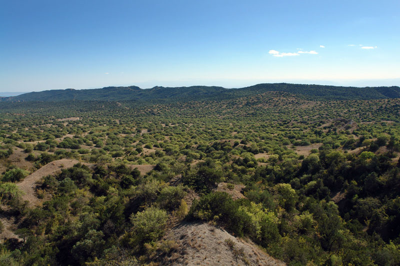 Vashlovani State Reserve